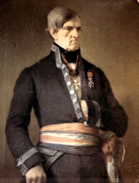 Louis-Furcy Grognier, maire d'Aurillac, portrait par Éloy Chapsal, 1856, huile su toile 116x86 Musée d'Aurillac.